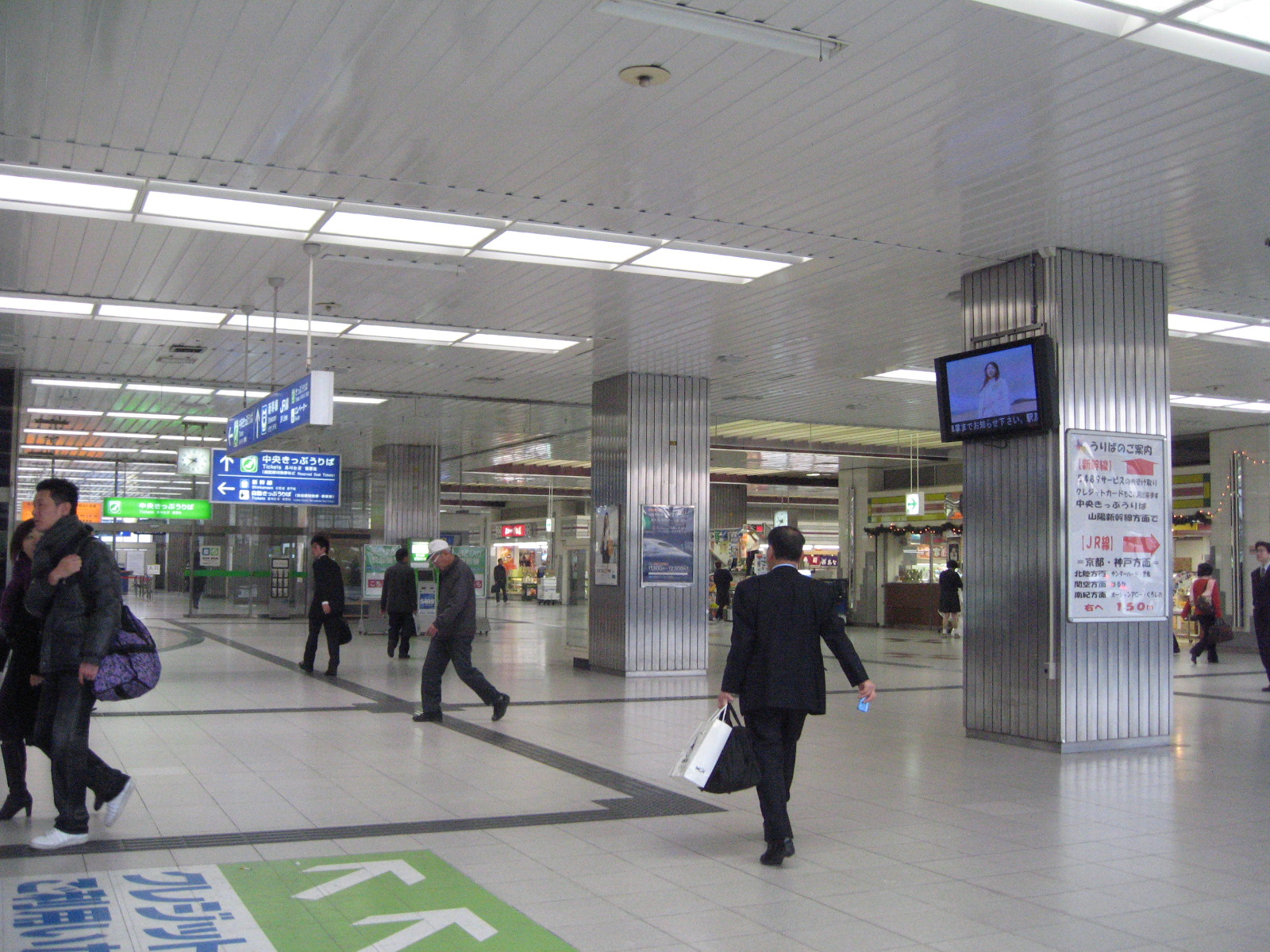 Shin-Osaka Station, Osaka, Kansai Region.